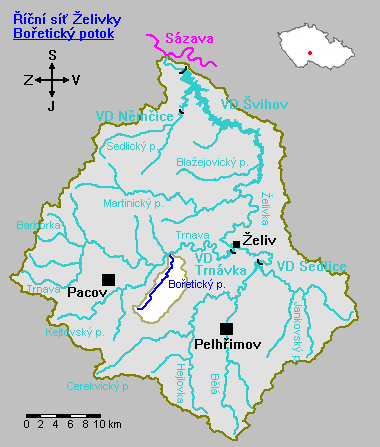 Říční síť Želivky - Bořetický potok